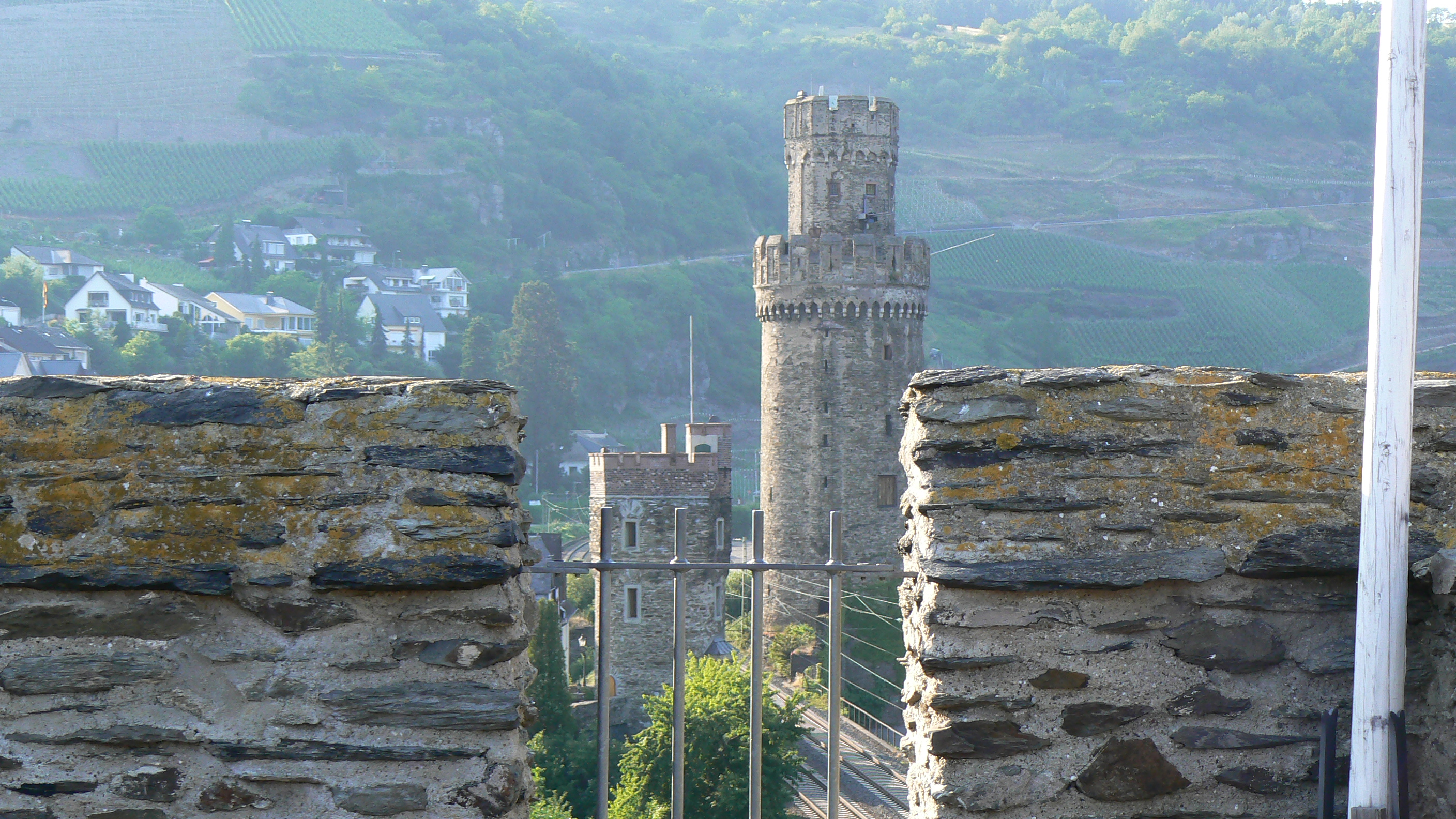 Stadtmauer Oberwesel mit Ochsenturm